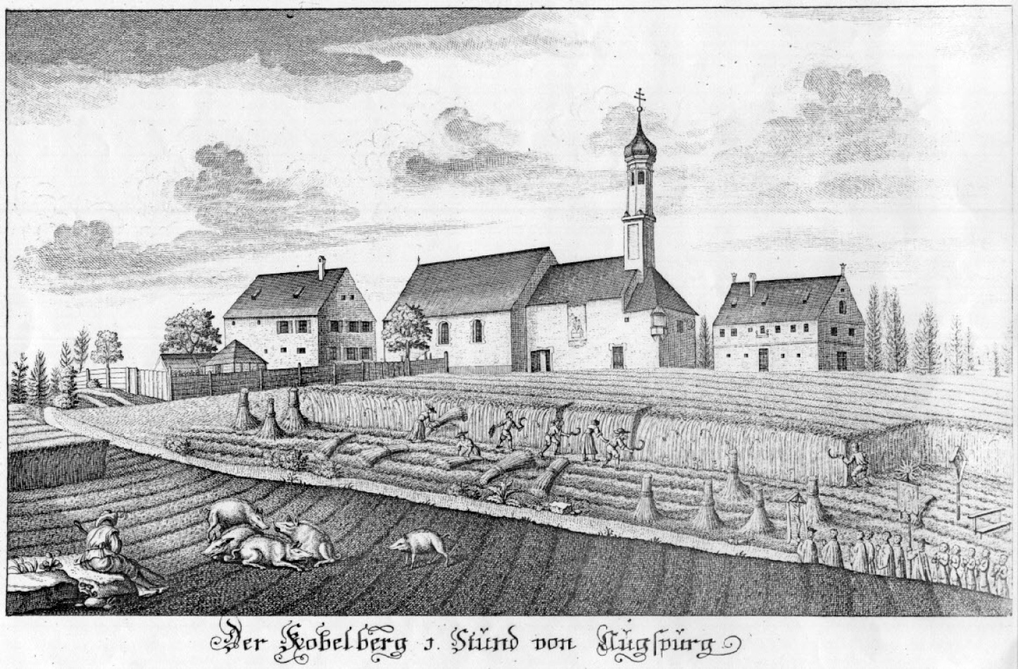 "Der Kobelberg 1 Stund von Ausgpurg". Stich von Johann Jakob Kleinschmidt, 1720.